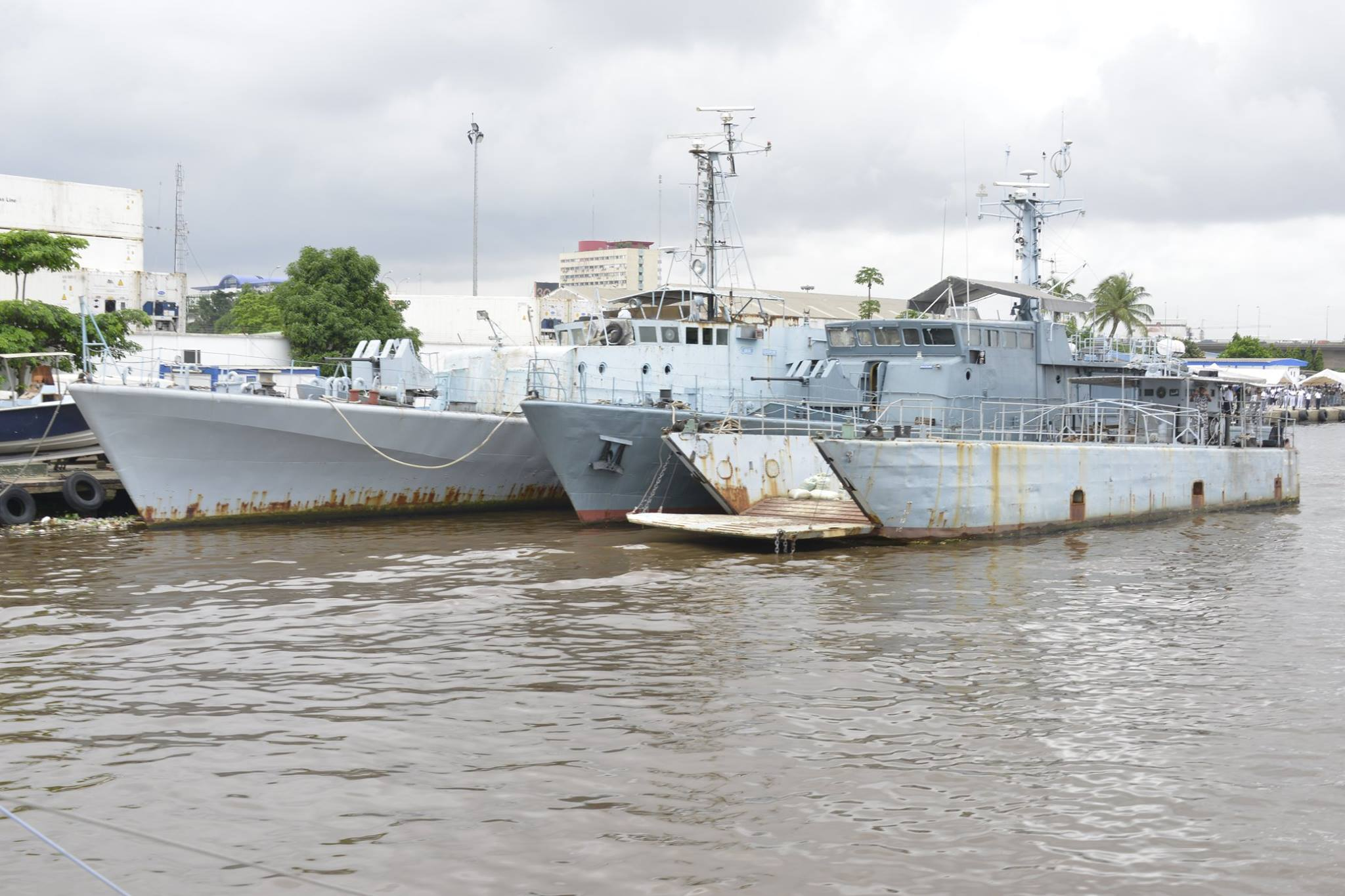 CTM TIAGBAN (dernier navire sur la droite)